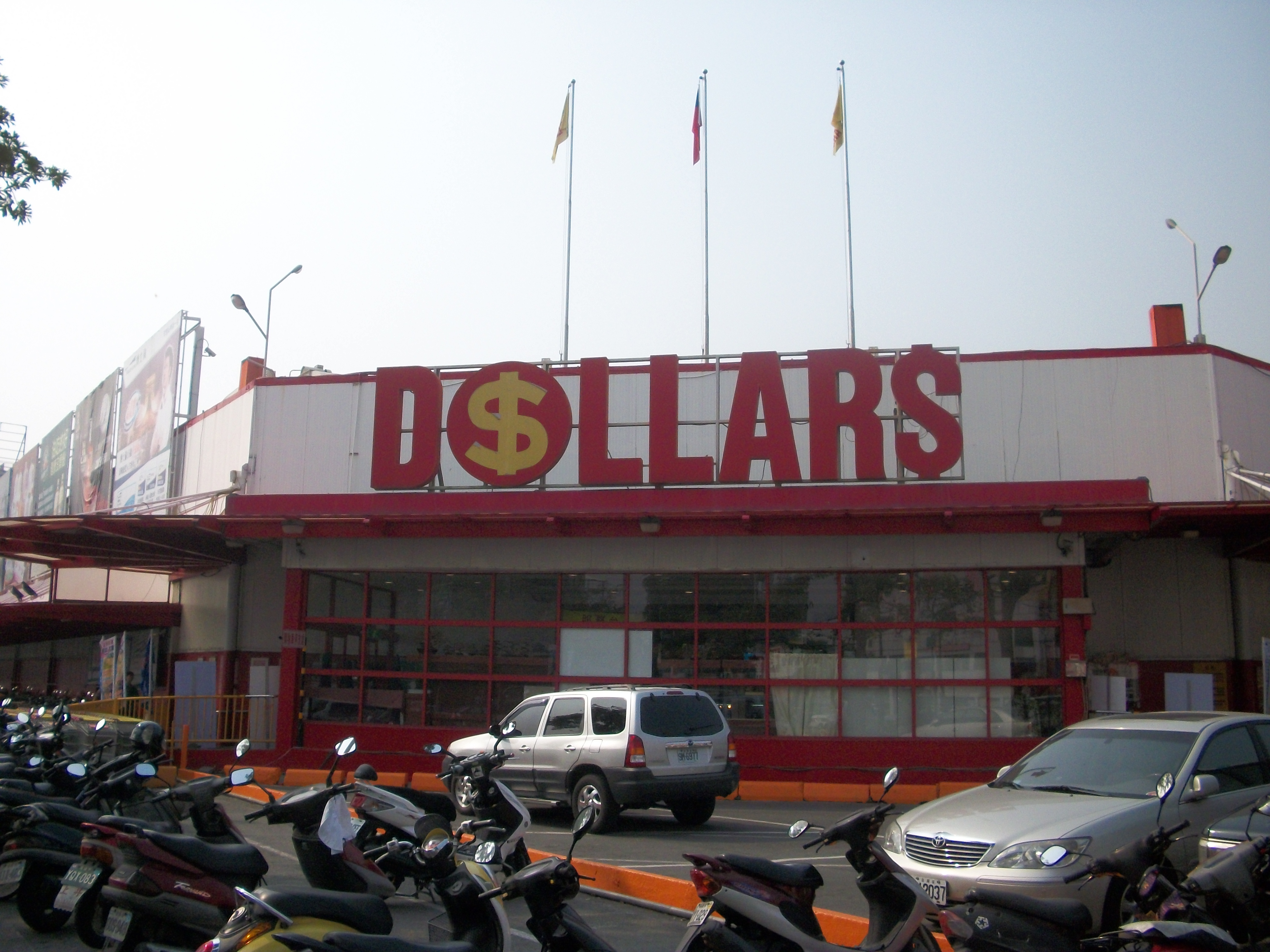 自行拍攝